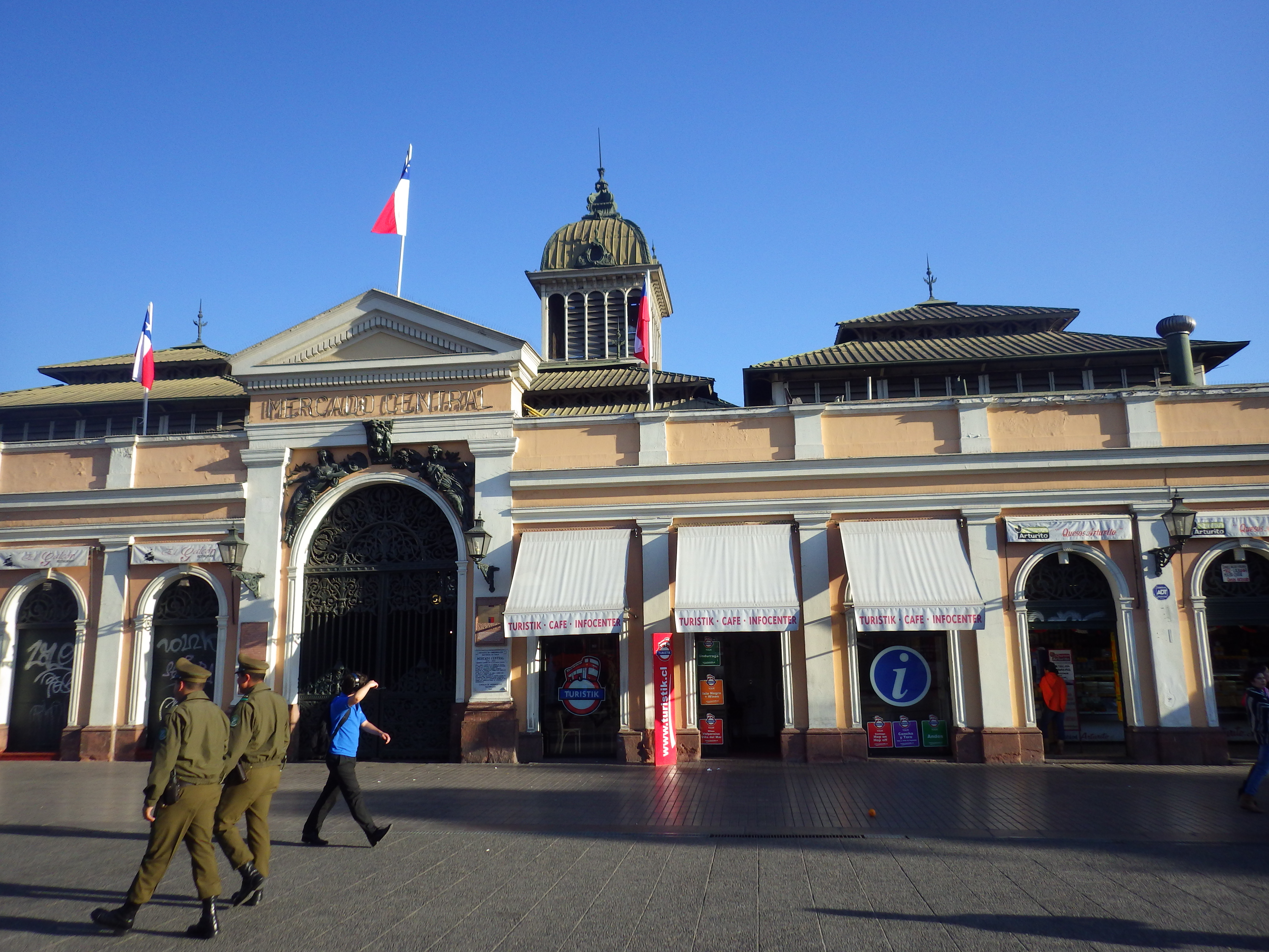 Mercado Central de Santiago This is a photo of a national monument in Chile: 860